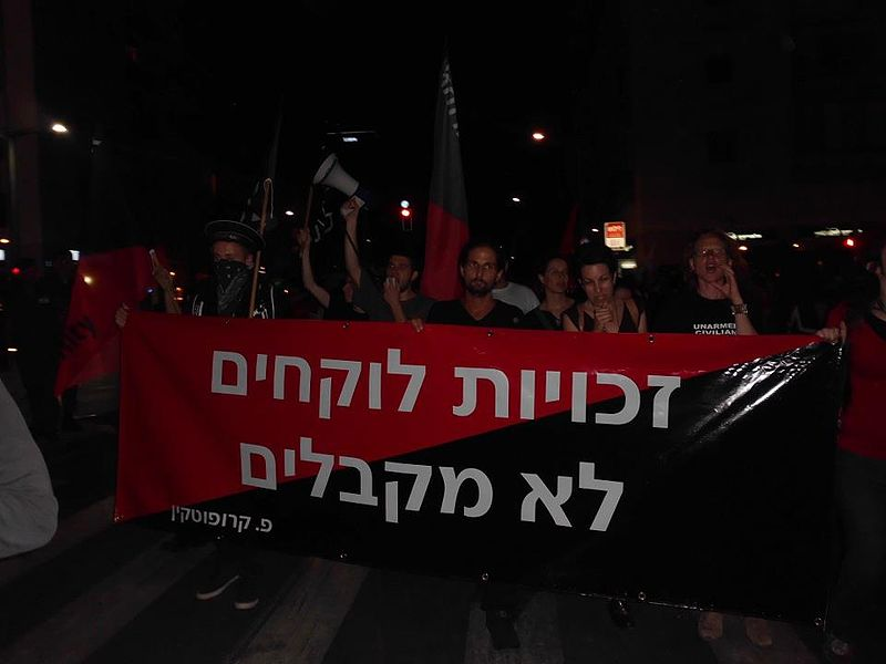 права берут, не получают